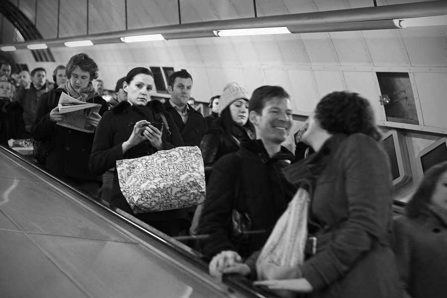 Группа людей на экалаторе